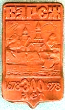 Нагрудный значок "Вареж" (Нижегородская область)